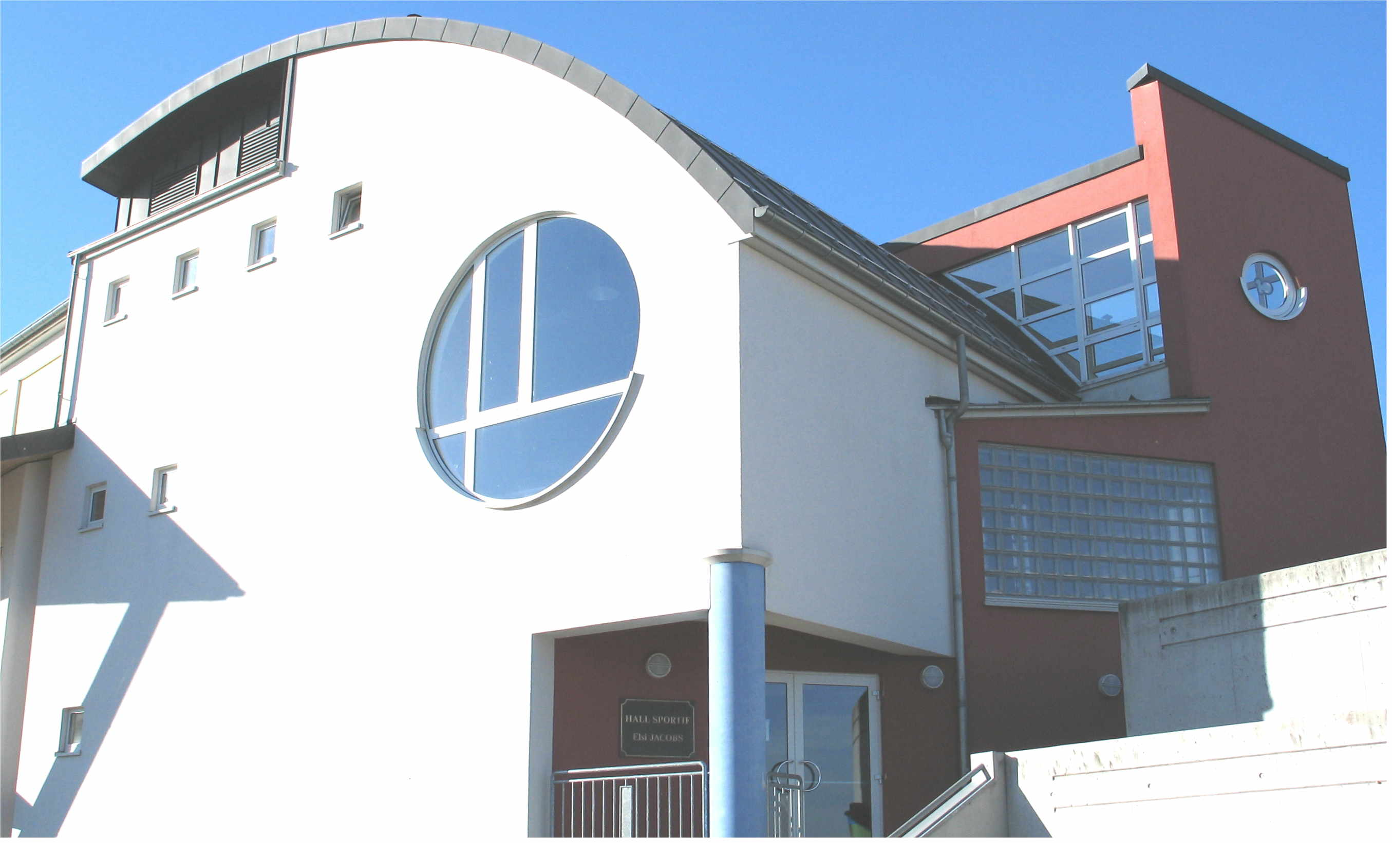 D'Sportshal Elsi Jacobs zu Garnech Kategorie:Gemeng Garnech